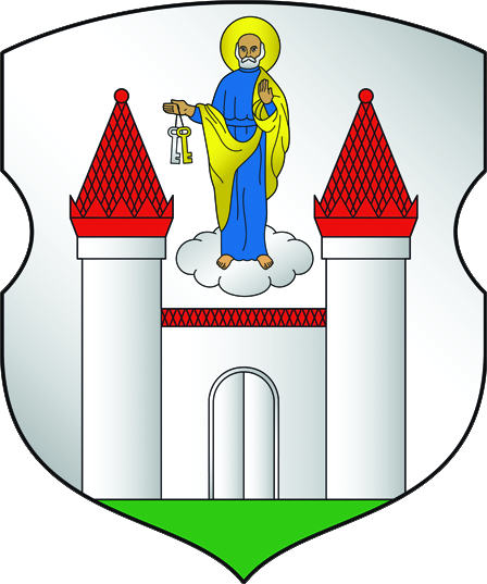 Беларуская (тарашкевіца): Герб гораду Барысава